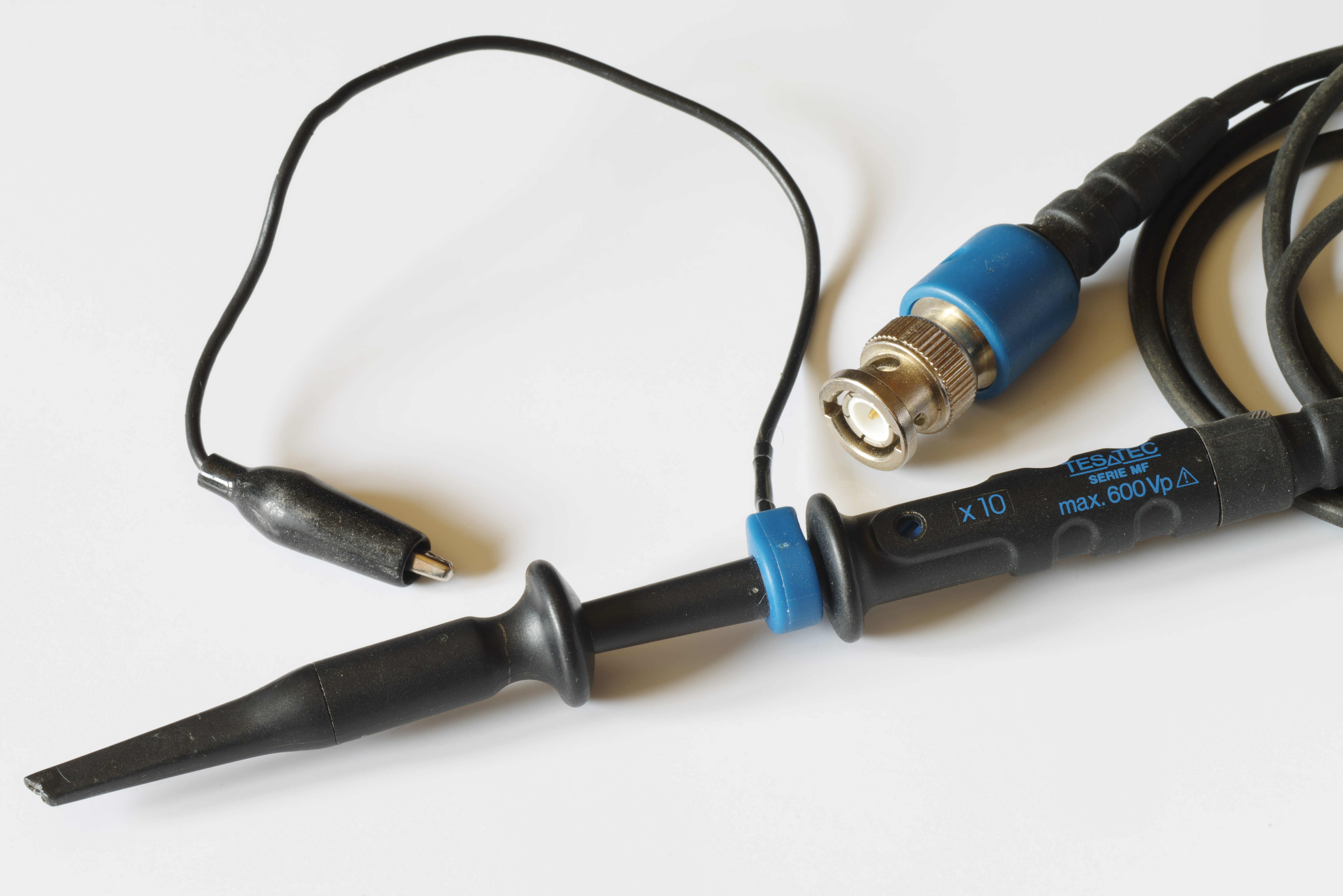 Standard-Tastkopf für Oszilloskope mit BNC-Stecker, Masseklemme und montierter Federklemme. Der Tastkopf weist ein Teilerverhältnis von 10:1 auf sowie die übliche Abgleichmöglichkeit für die Kapazität